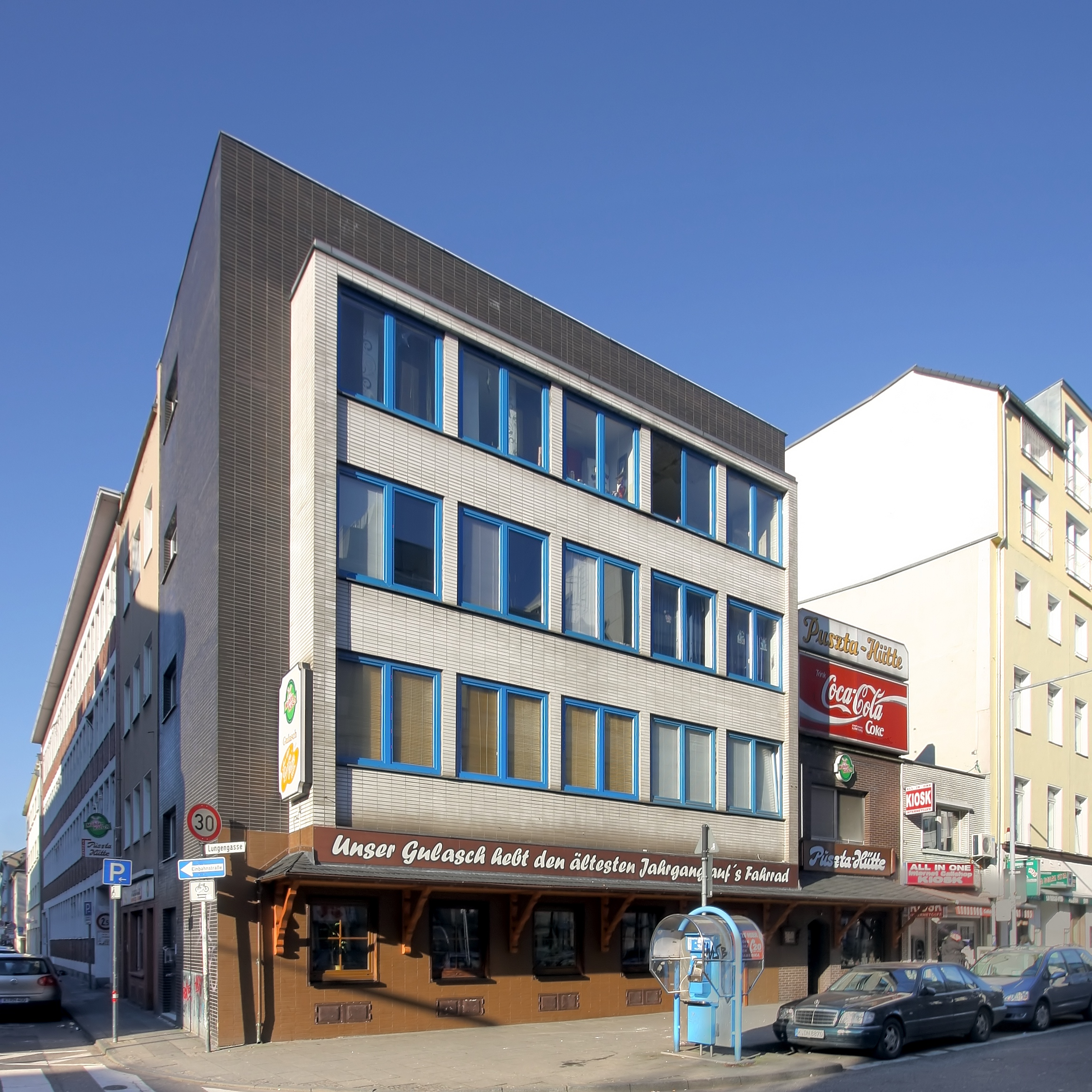 Puszta-Hütte, Fleischmengengasse, Köln